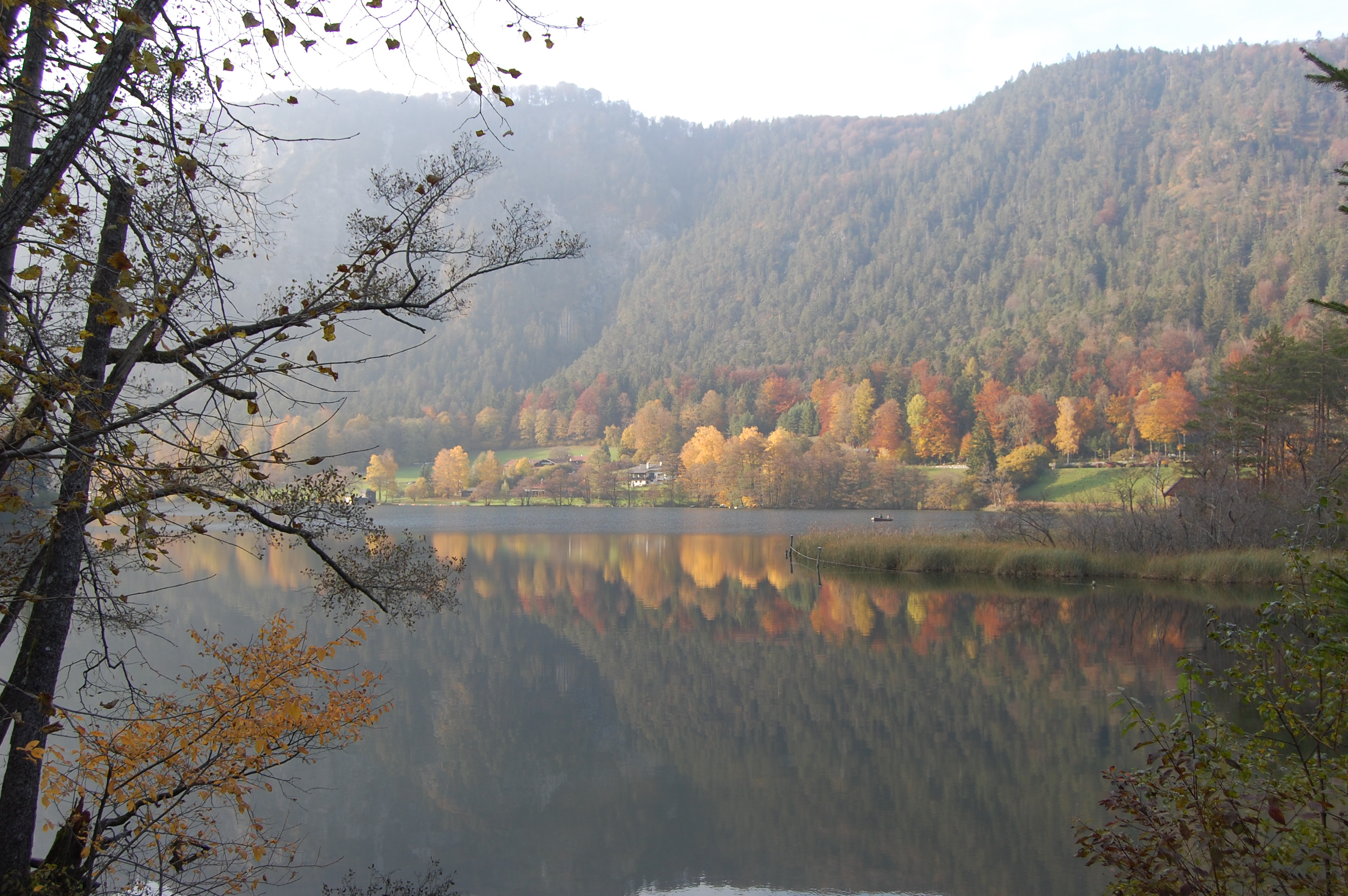 Thumsee (Nähe Bad Reichenhall) im Herbst 2009